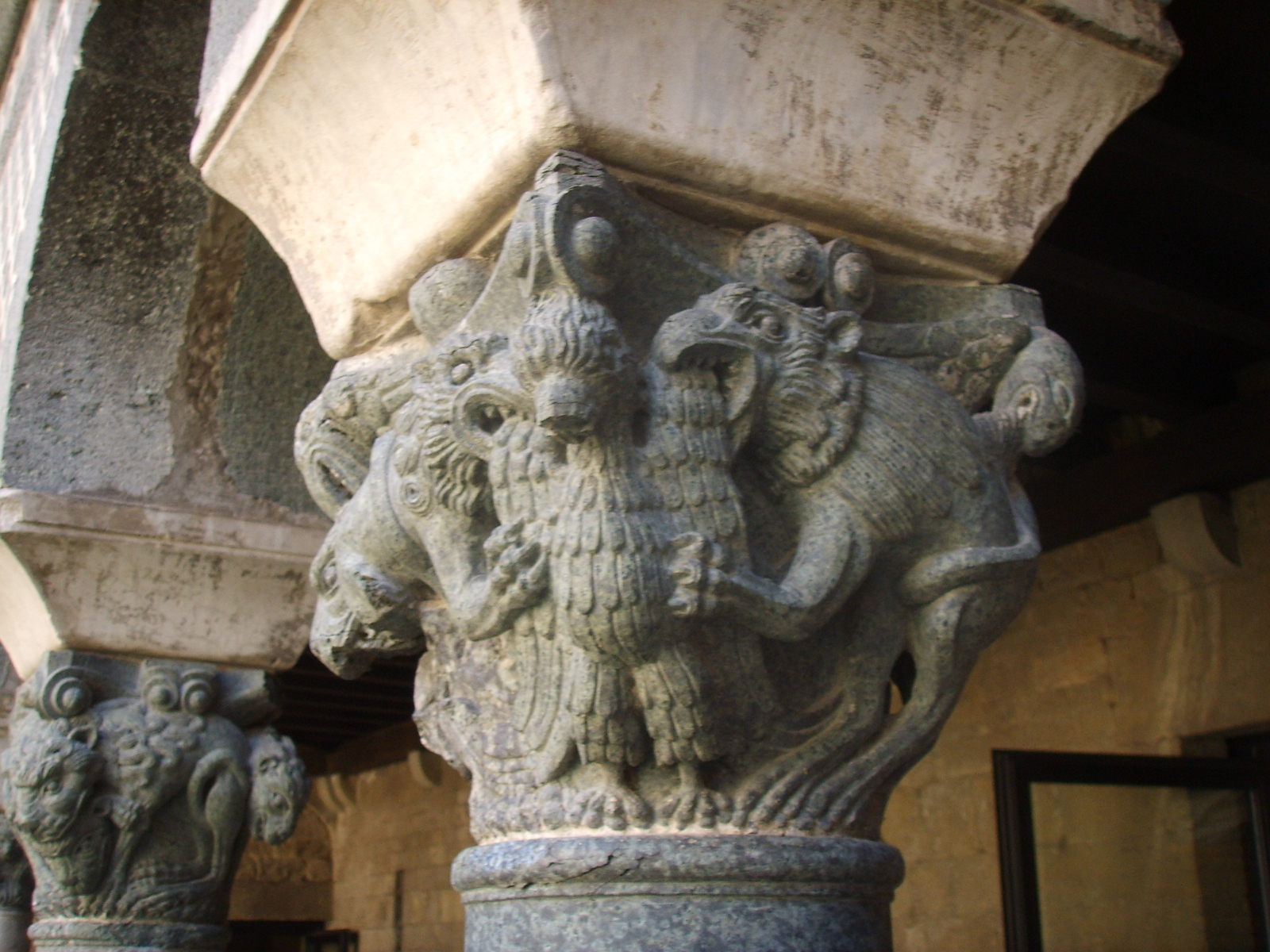 Chiostrino dell'opera del duomo di prato capitello